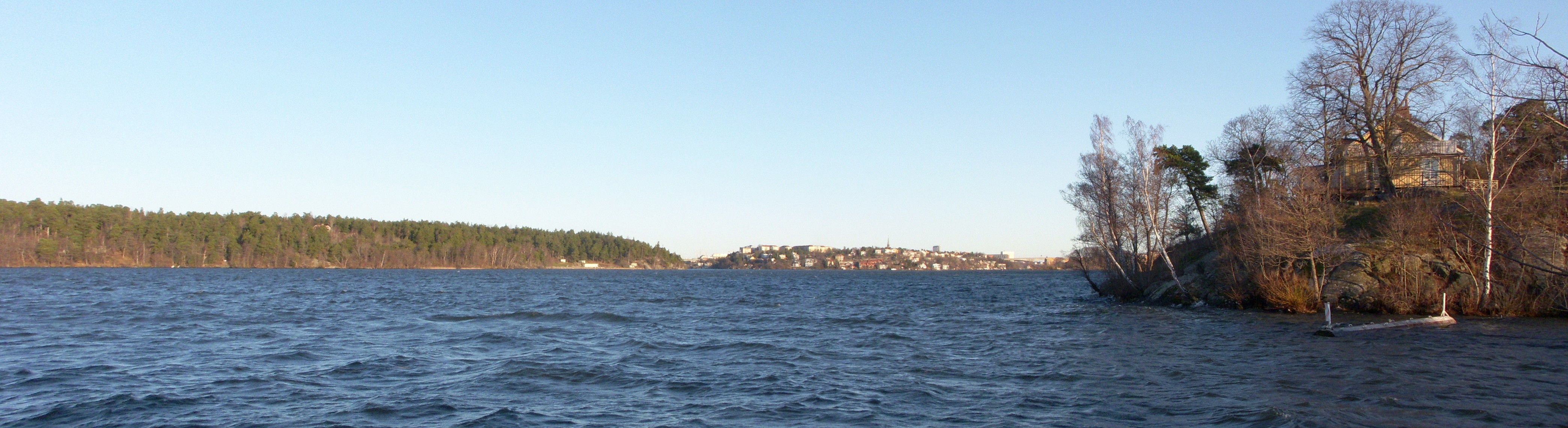 Klubbfjärden, vy mot öst med Klubbensborg till höger och Stora Essingen rakt fram.